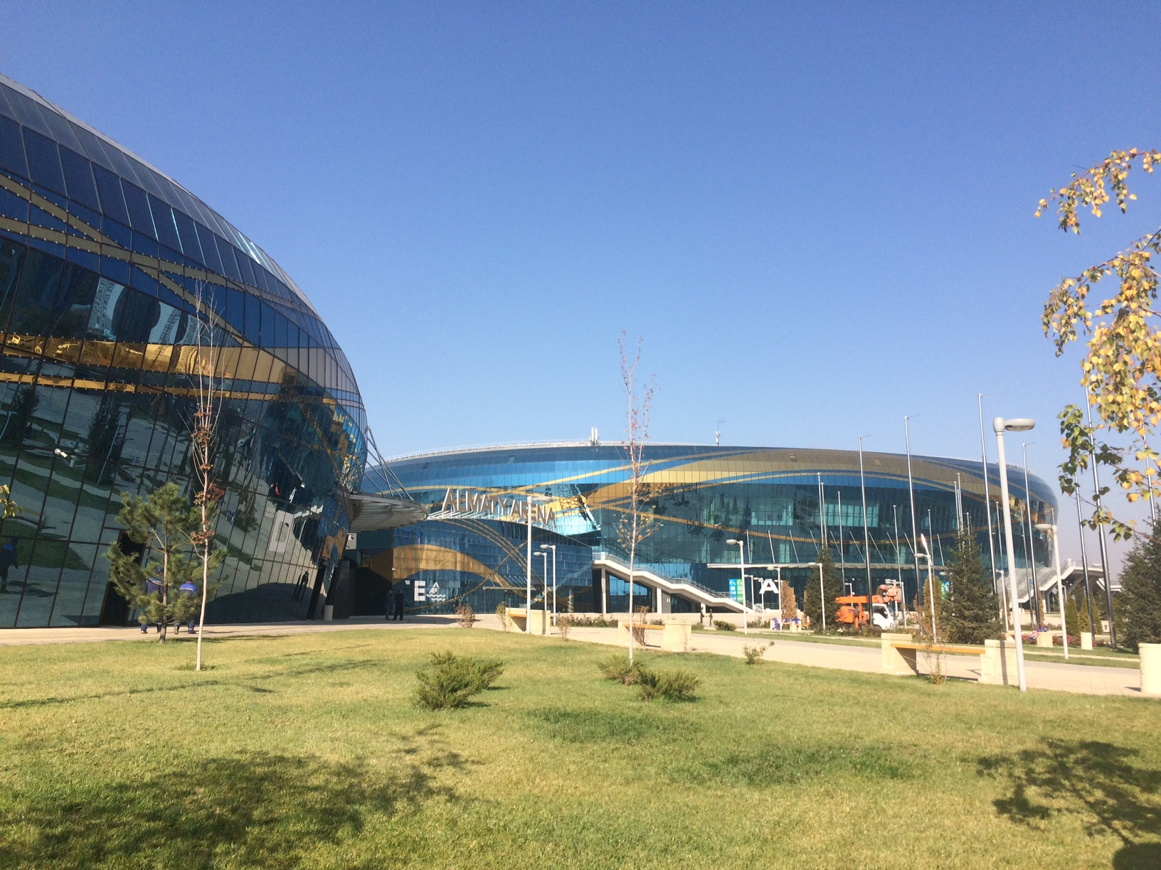 Ледовый дворец "Алматы Арена"